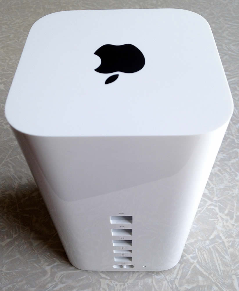 Apple Time Capsule: G5. Вид сзади